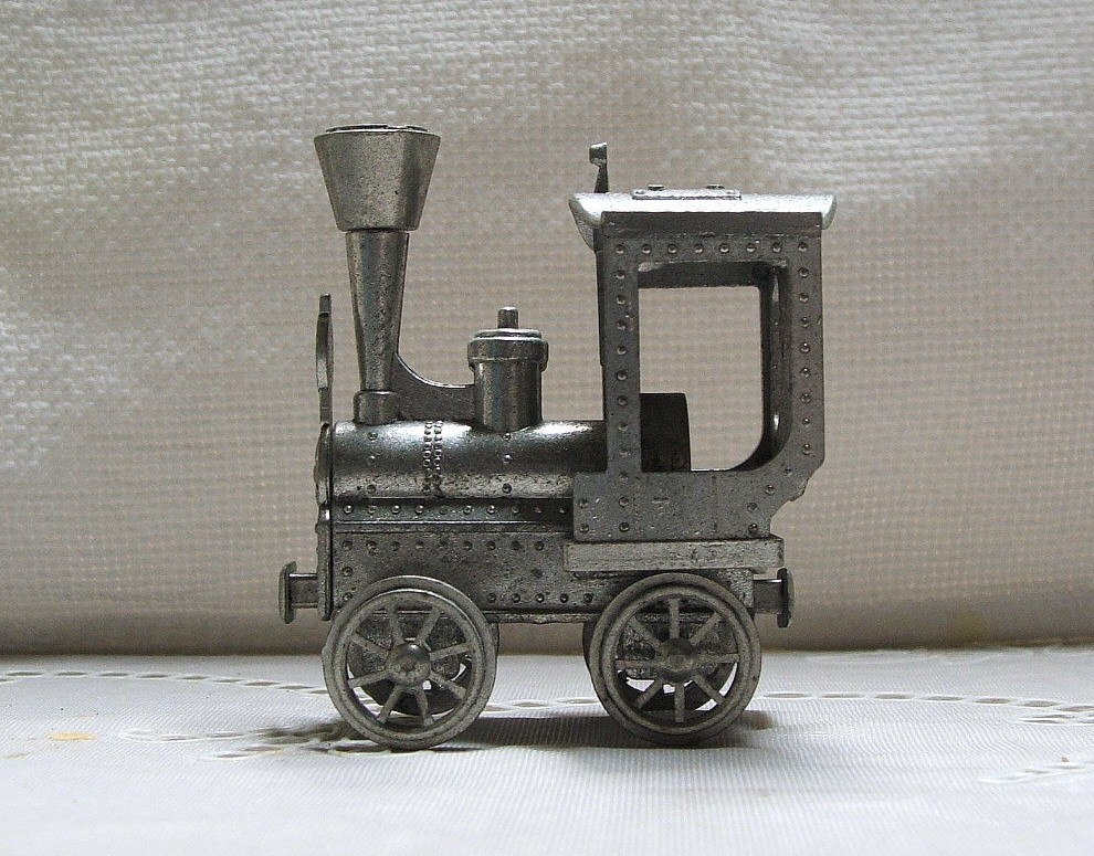 Andorno (Biella) - Modellino in metallo di un'antica locomotiva.